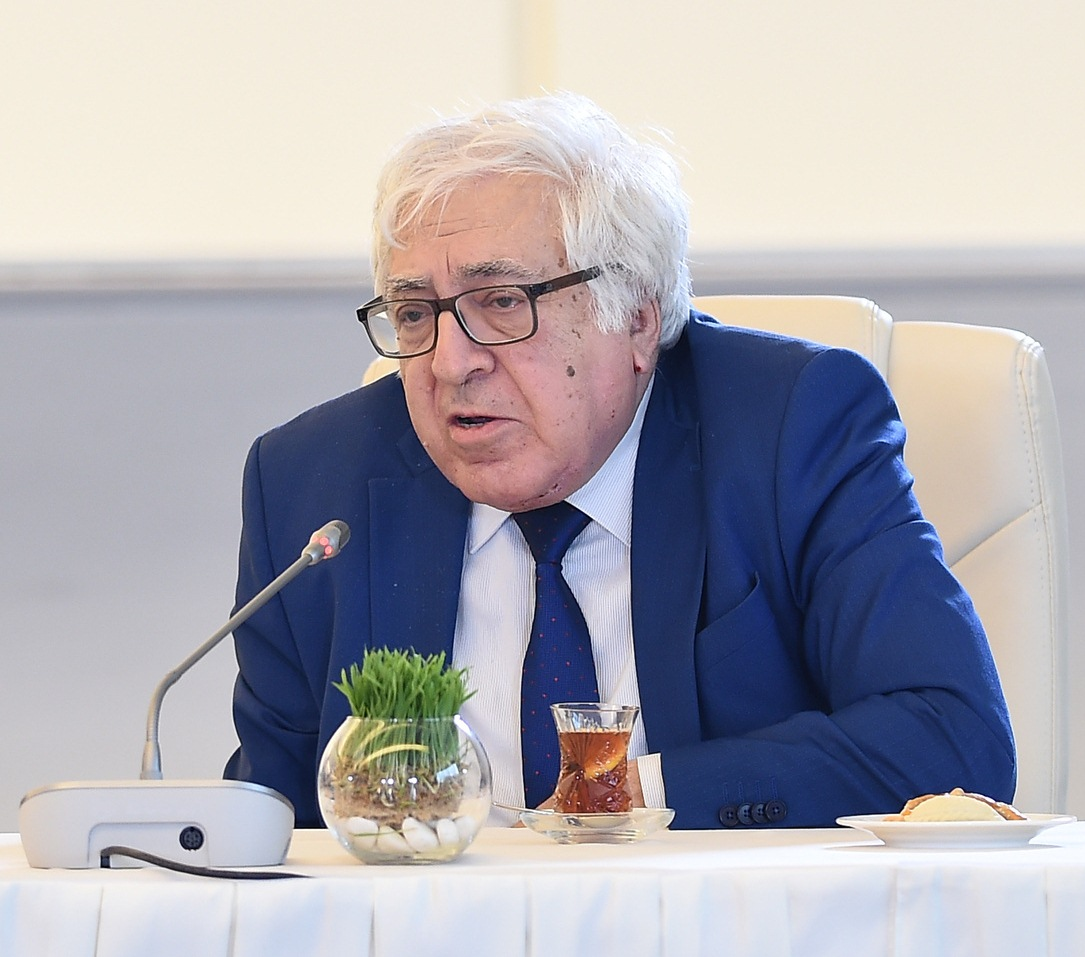 Azərbaycanın mədəniyyət və incəsənət xadimlərinin bir qrupunun Azərbaycan Respublikasının Prezidenti İlham Əliyev və birinci xanım Mehriban Əliyeva ilə görüşündə şəkilmiş foto